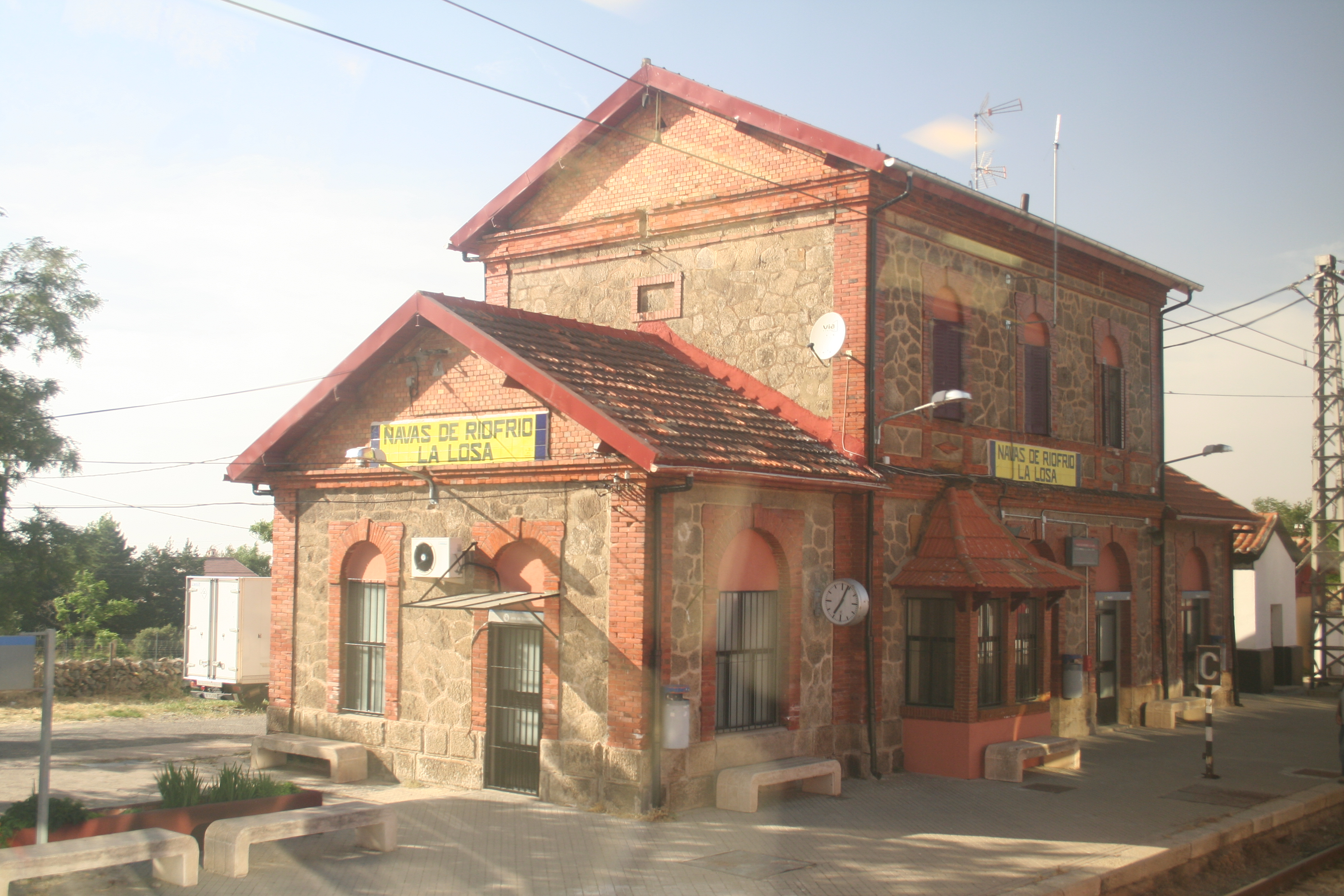 Estación de Navas de Riofrío-La Losa.